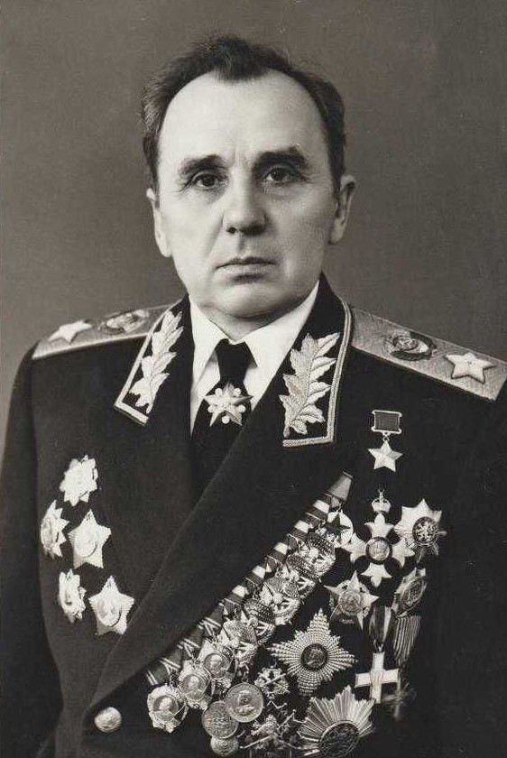 Маршал Советского Союза Кирилл Семёнович Москаленко (1902 — 1985)